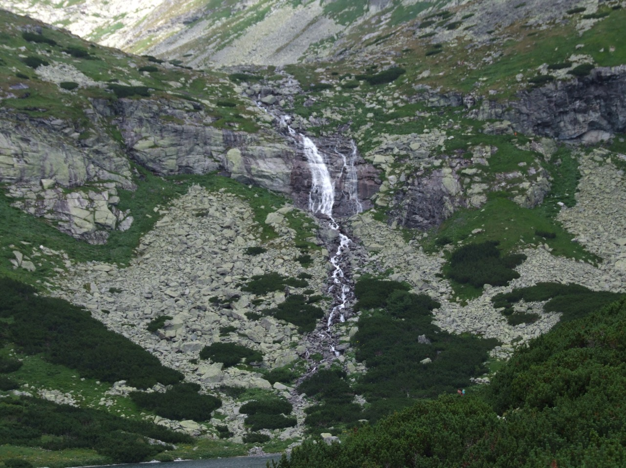 Wielicka Siklawa